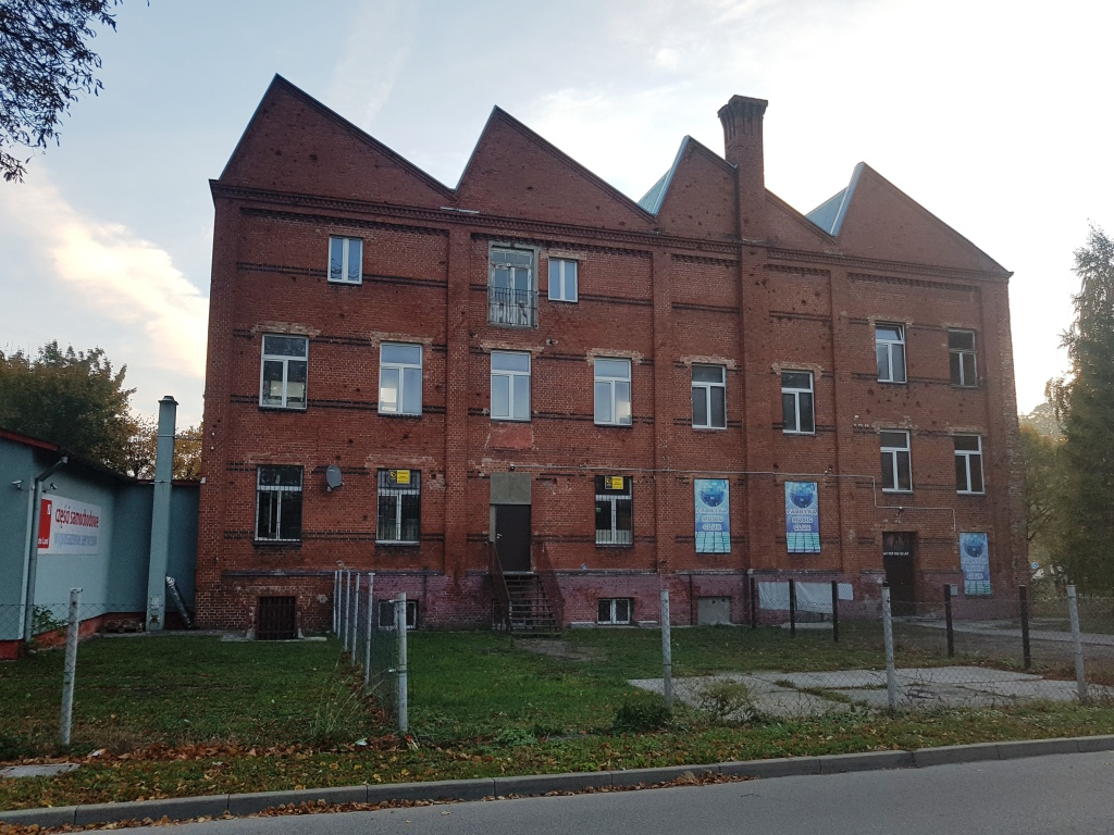 elbląska fabryka, filia wybudowane w Braniewie (1885) Loeser & Wolff Tabakwarenfabrik Braunsberg